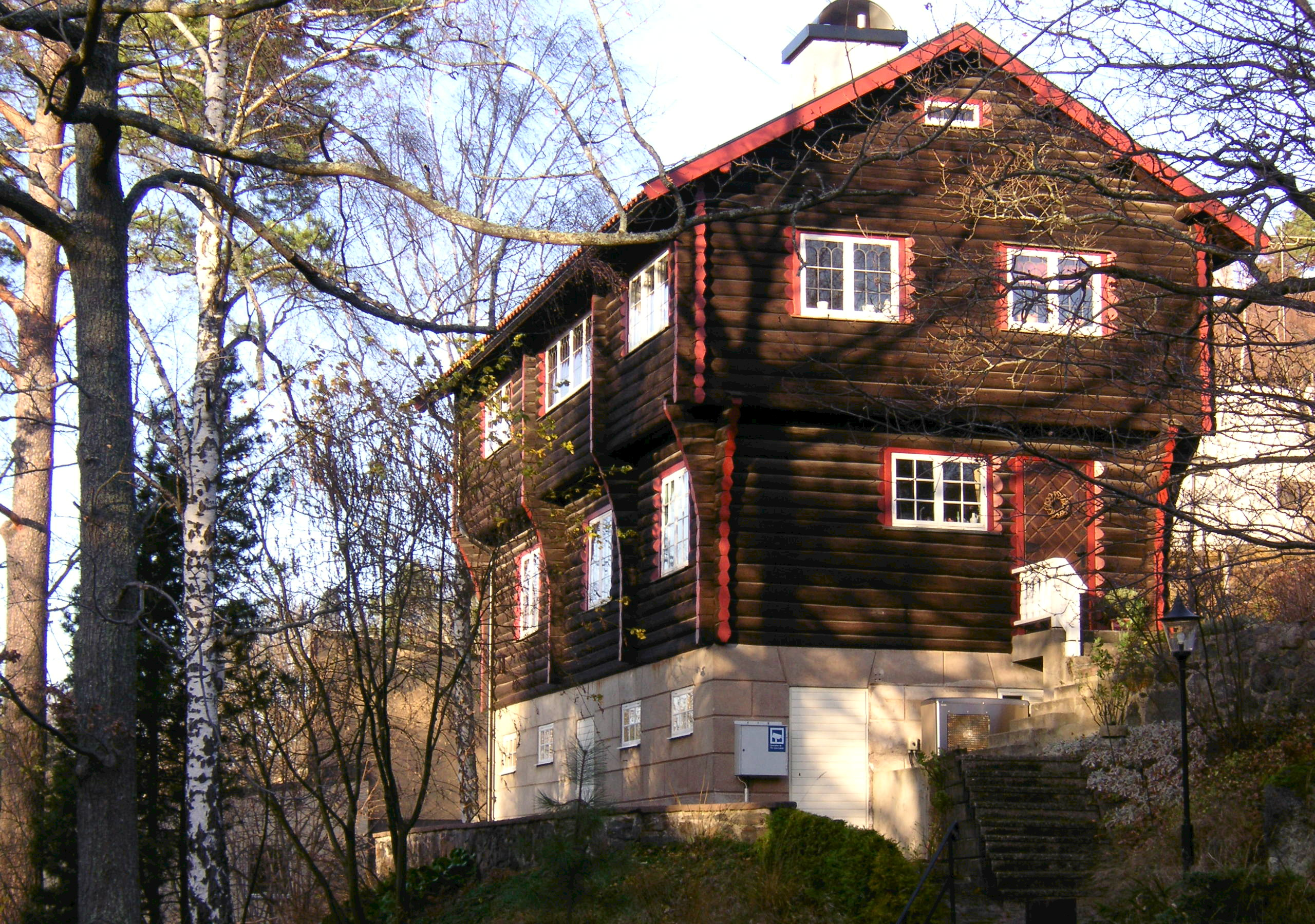 Pukslagaren 43 (Myrvägen 54) i Långsjö, arkitekt Sten Westholm (1928)